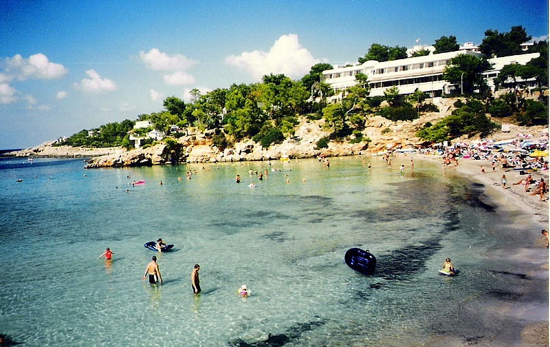 Cala Portinatx